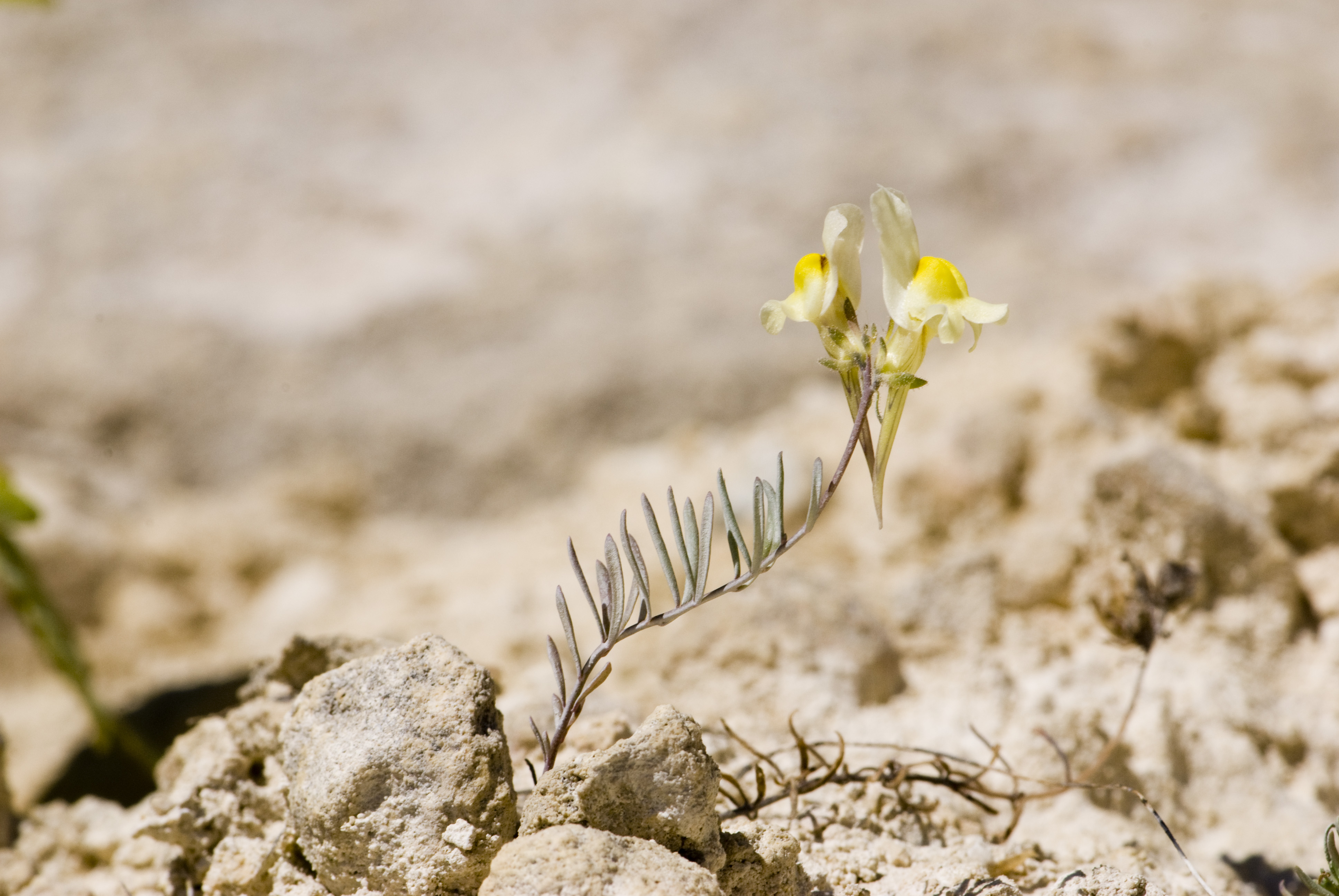 Linaria supina carrières de Saint-Vaast-lès-Mello (Oise), France